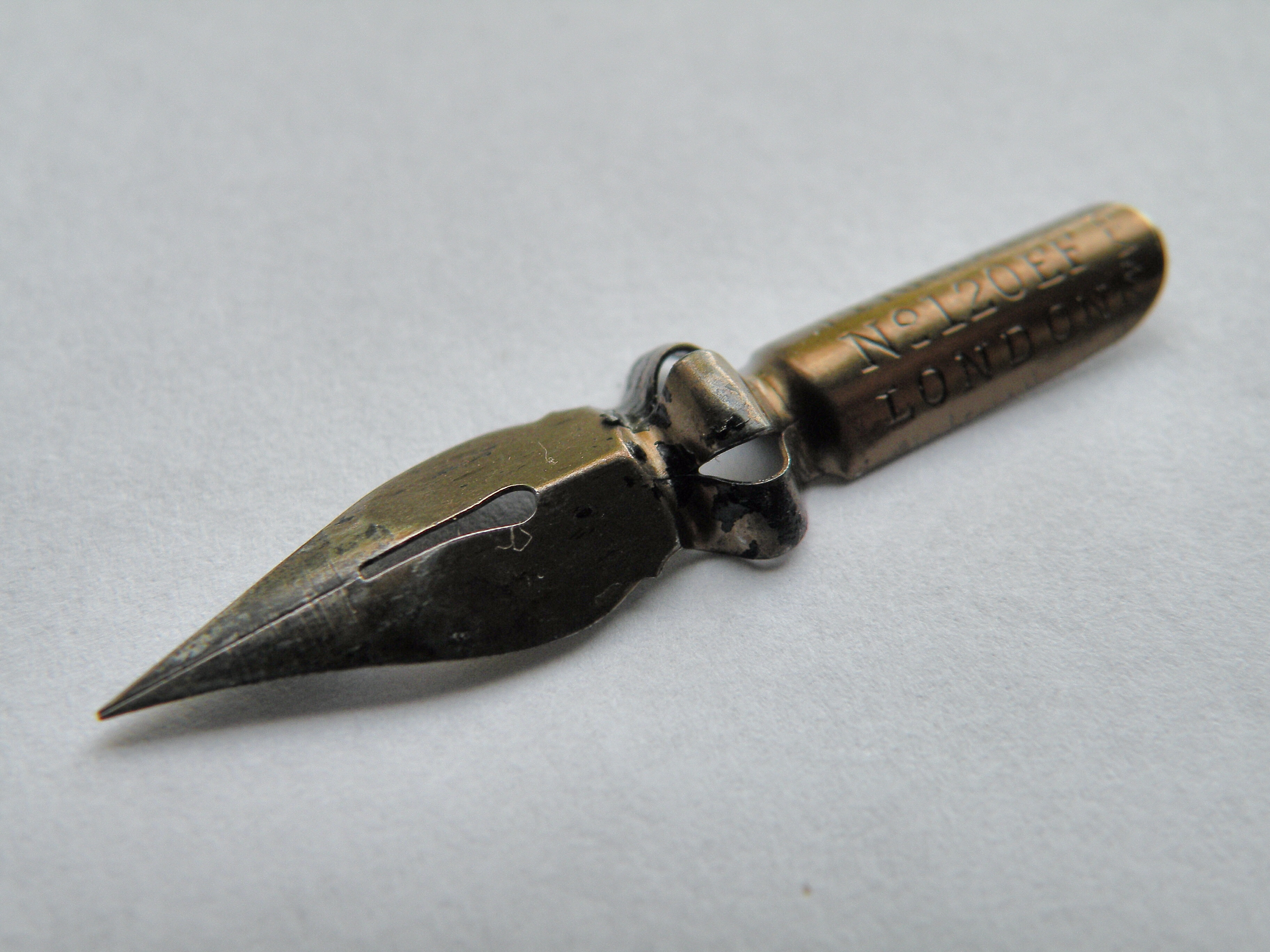 Ouderwetse kroontjespen te gebruiken in een penhouder en te dopen in een inktpot